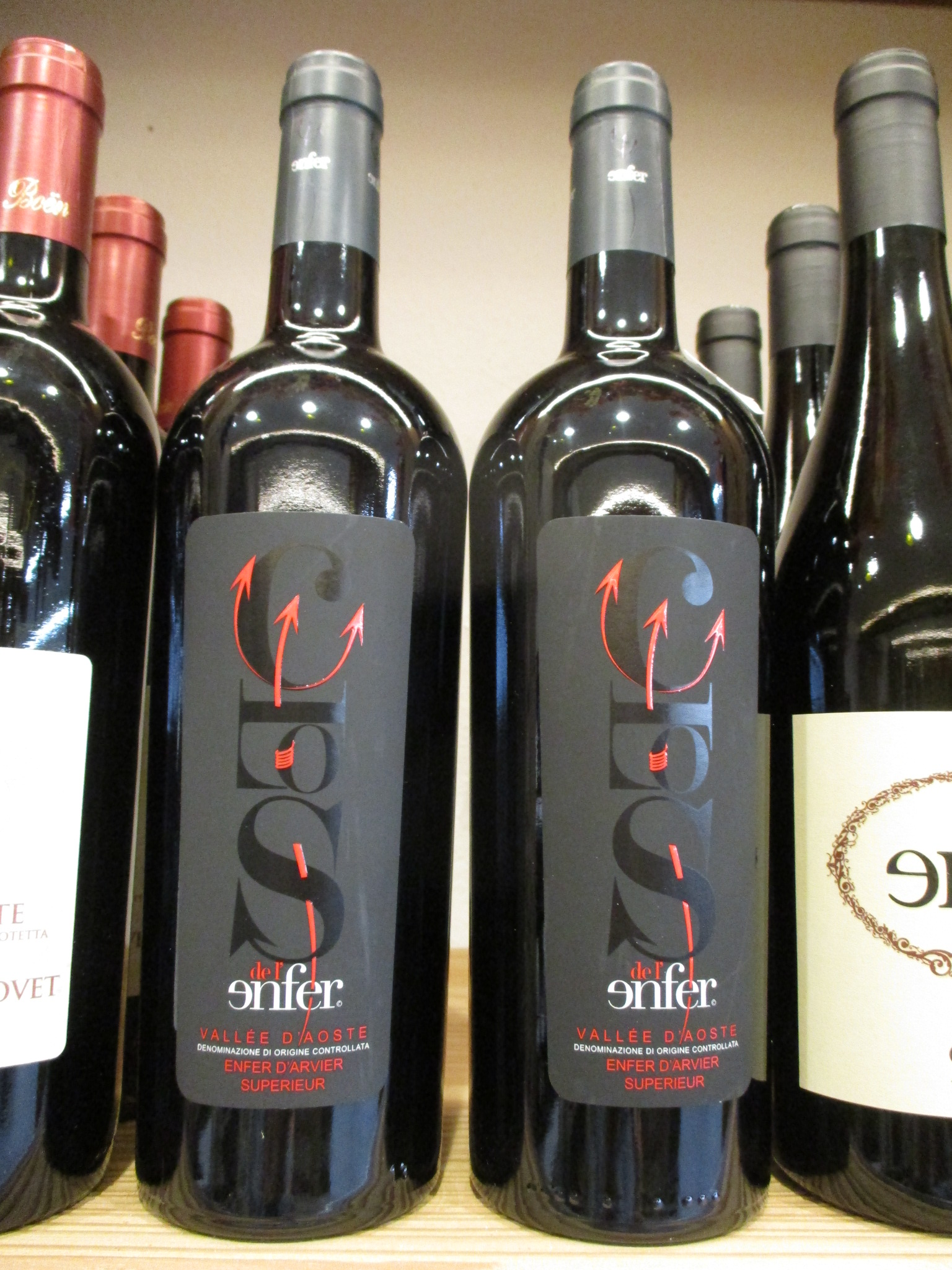 Vineyards in Aosta Valley